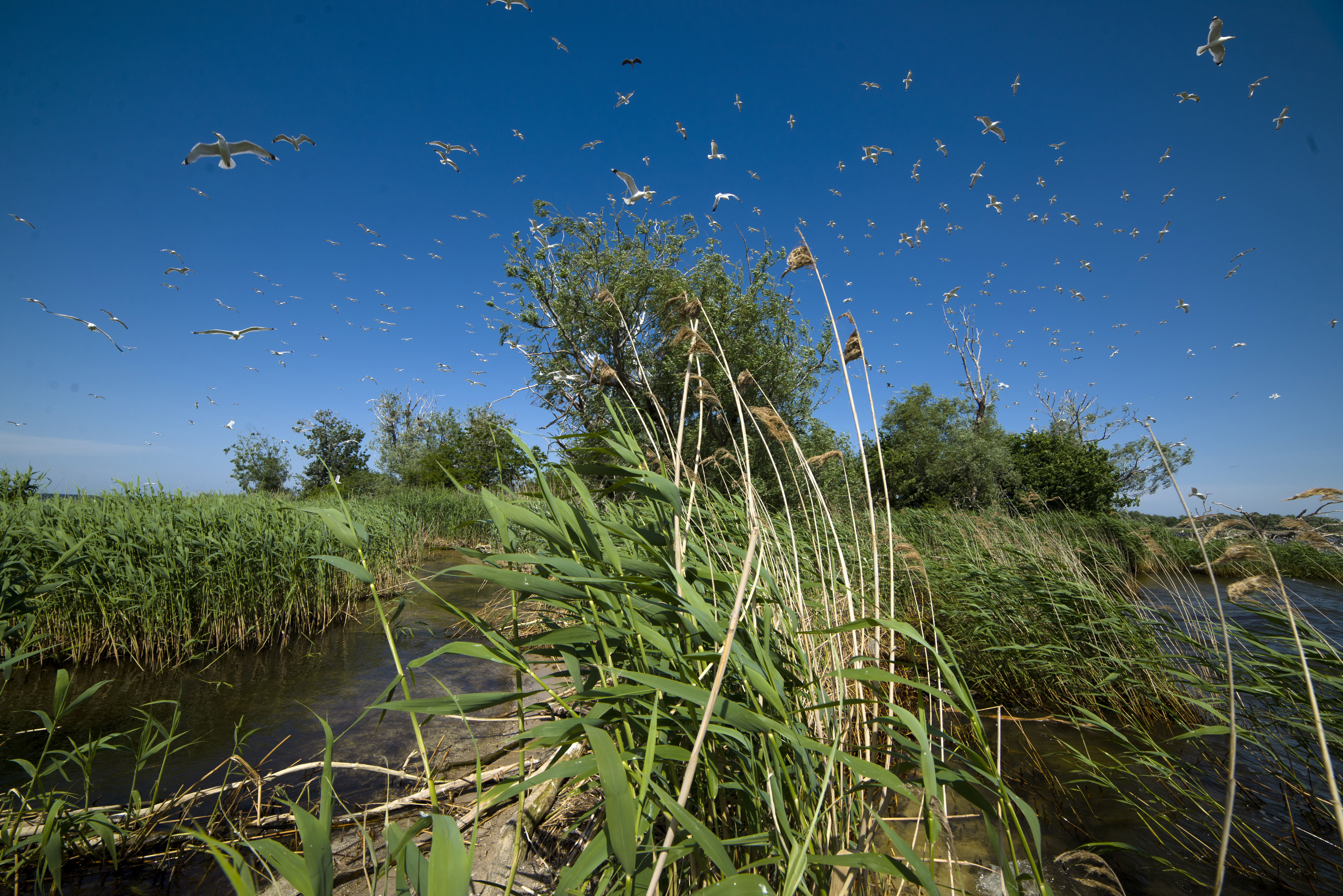 Великий Луг, Василівський район, м. Дніпрорудне, с. Скельки, Маячка, акваторія Каховського водосховища